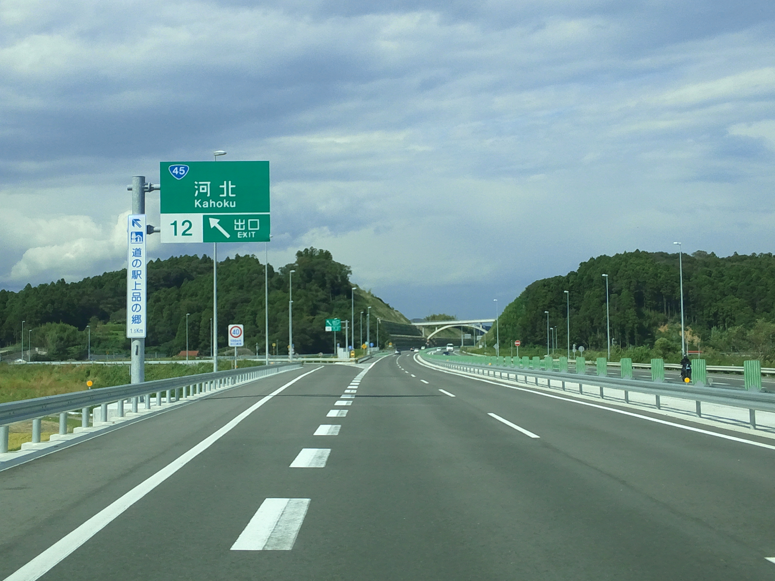 三陸自動車道河北IC下り出口付近